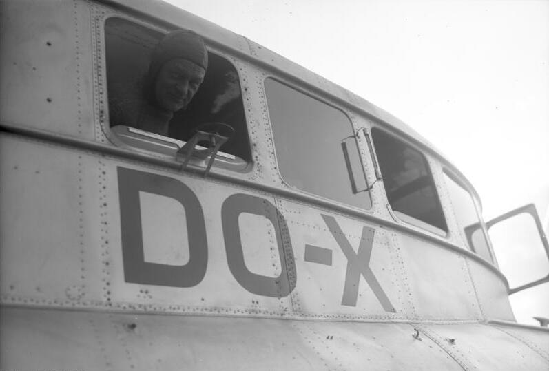 Der grandiose Flug der "Do X" über den Kanal von Amsterdam nach England! Der Führer der "Do X", Kommandant Christiansen, am Fenster des Kommandostandes.